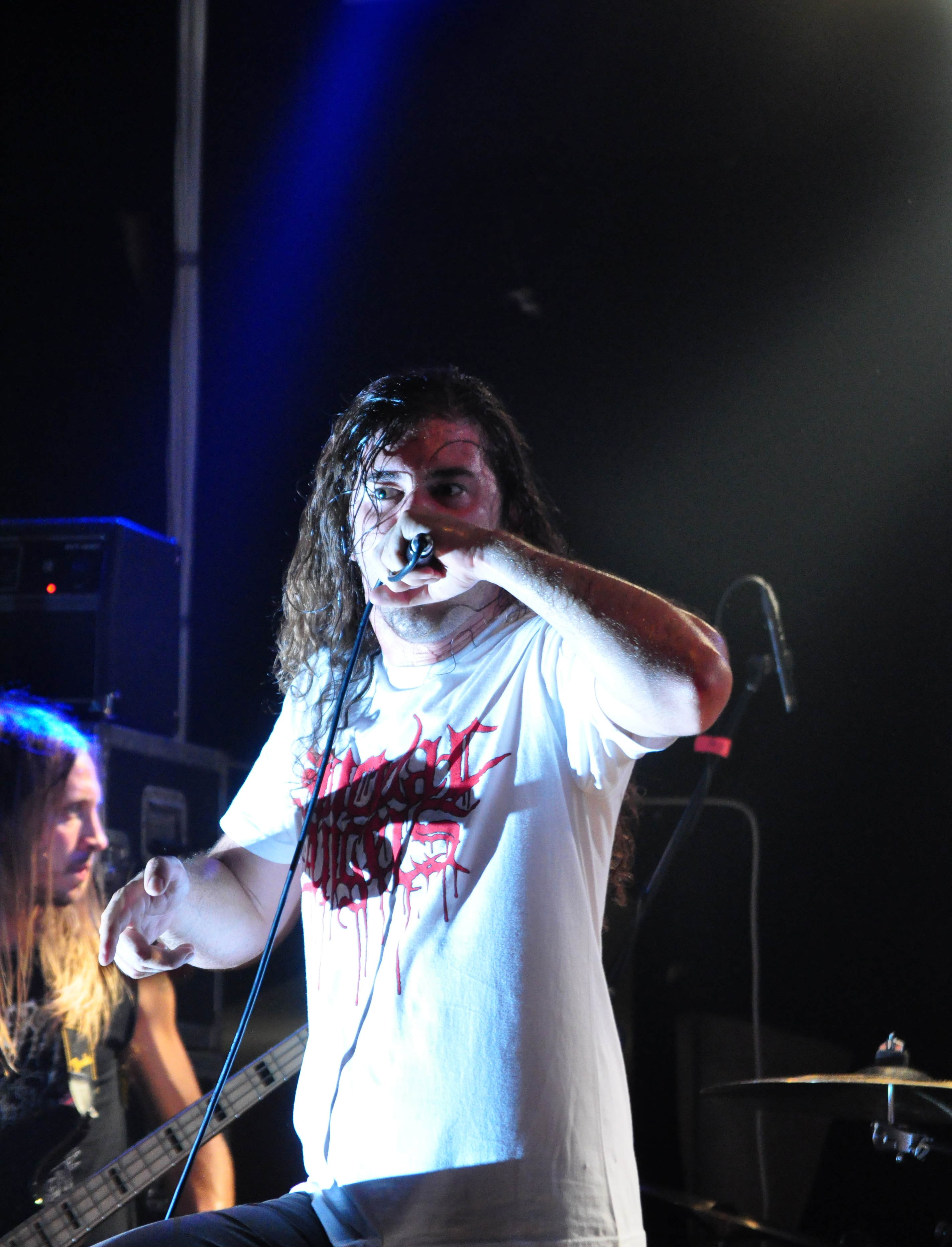 John Kevill, Warbringer_2